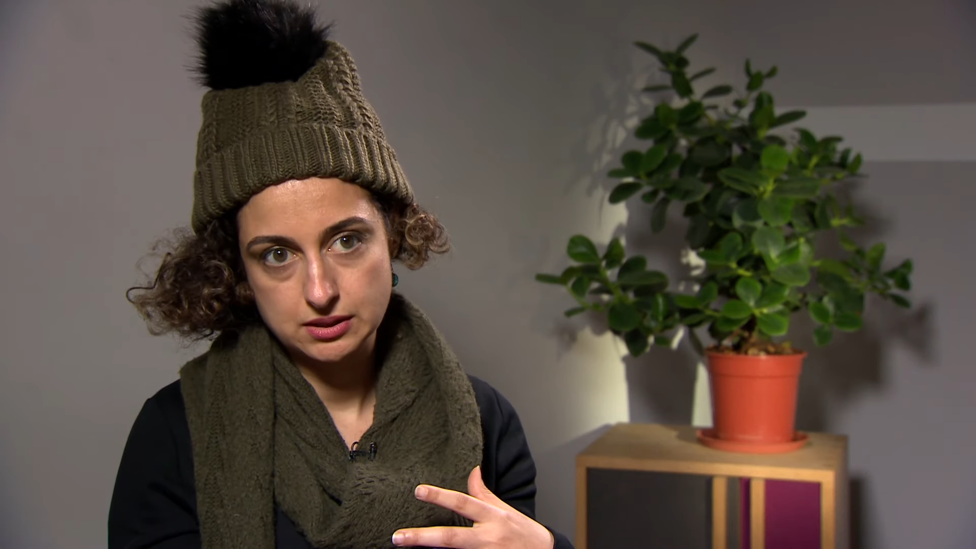 مریم مهاجر